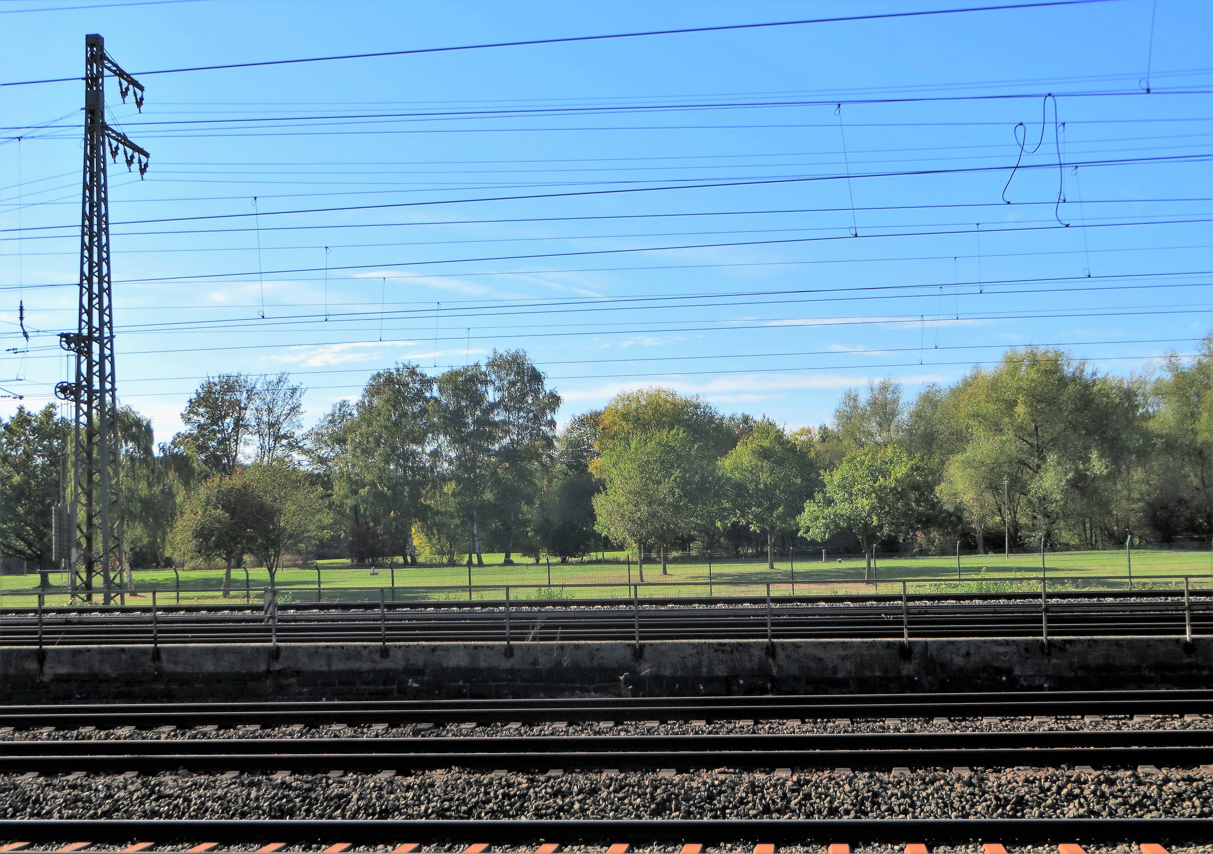 Landschaftsschutzgebiet „Wassergewinnungsanlage der Stadtwerke Hagen“ in Hagen-Boele, Seestraße, zwischen A 1, Volme und Bahnstrecke Hagen–Schwerte. Wasseranlage der Stadt Hagen mit Sickerbecken. Blick von der Niedernhofstraße über die Bahntrasse auf einen Teil der Anlage.